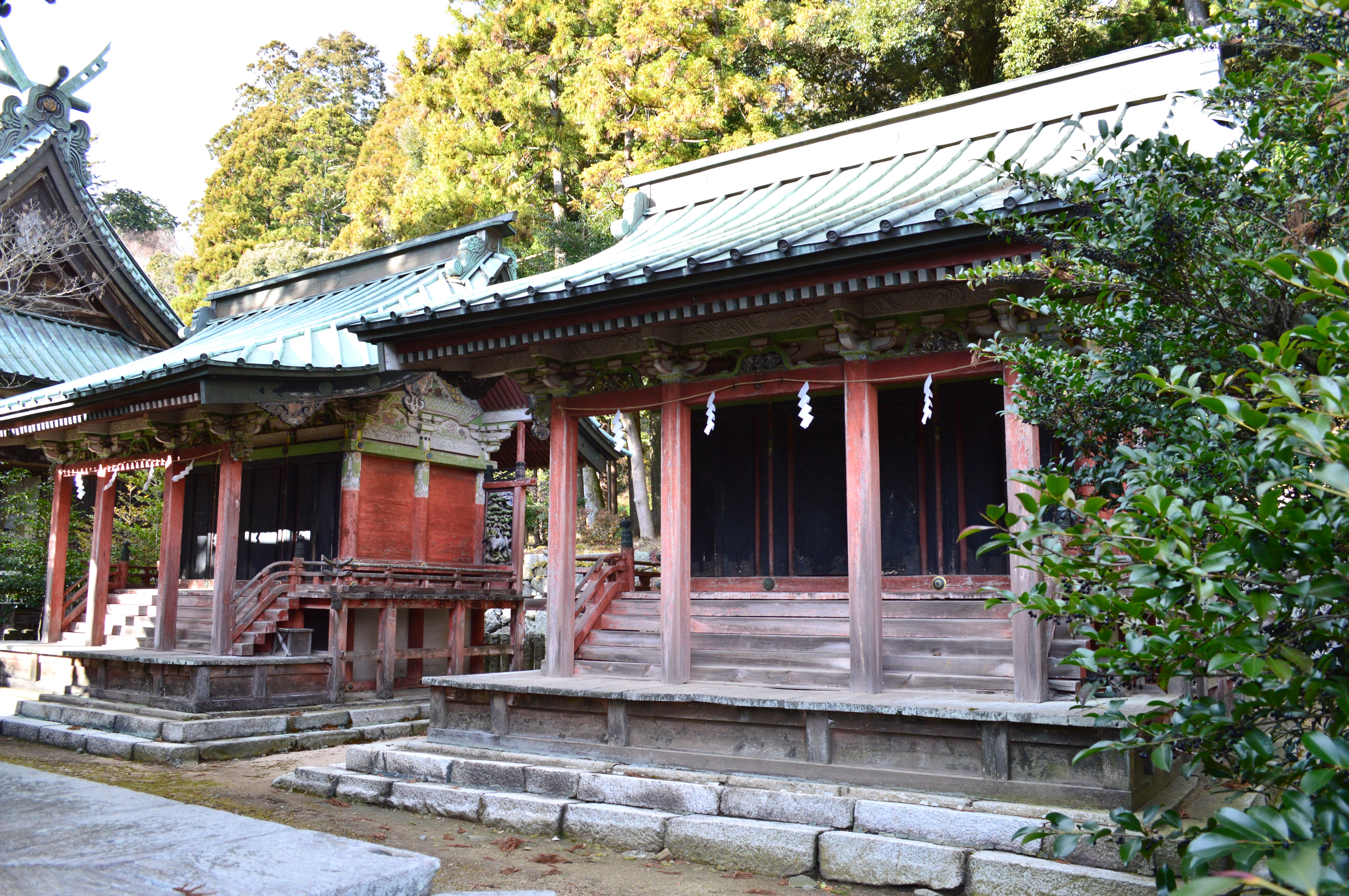 筑波山神社 末社 春日神社と日枝神社